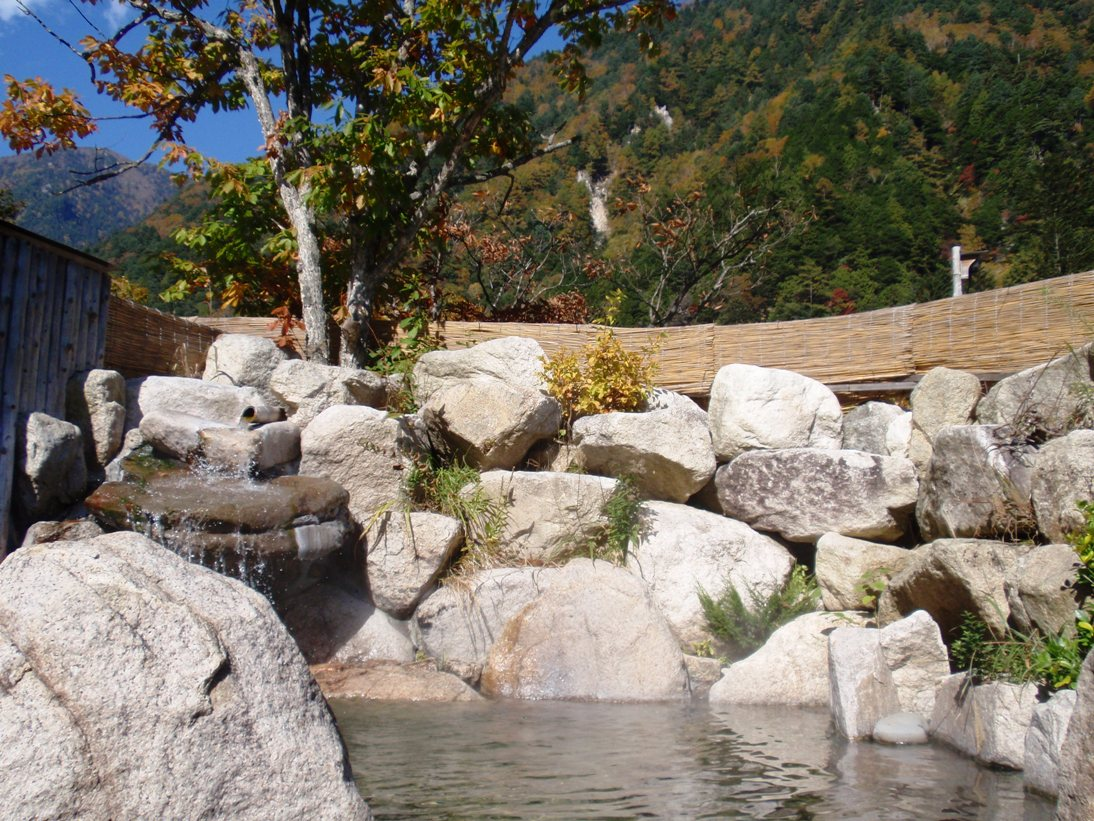 中房温泉湯原の湯